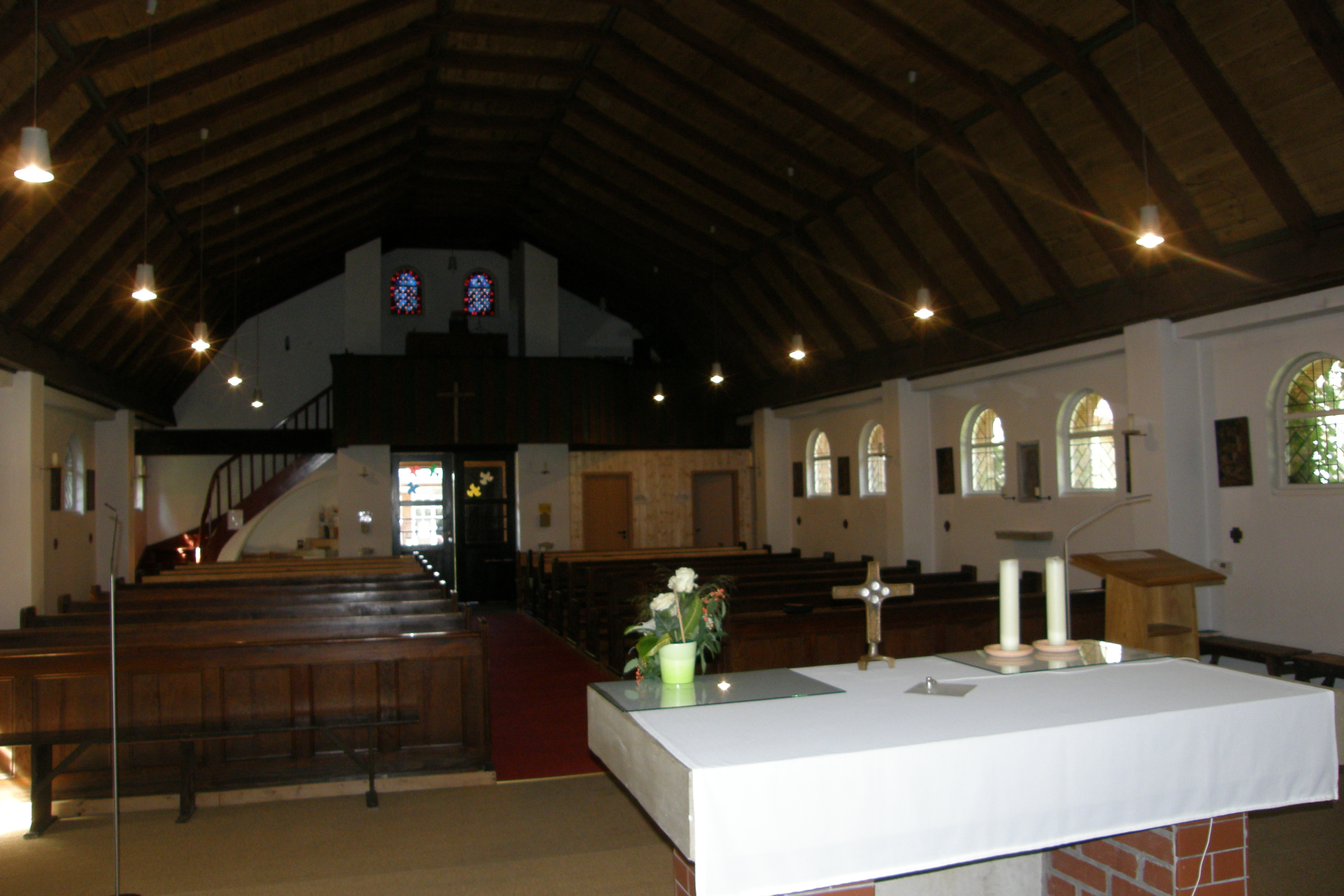 Blick in das Innere der Kirche, Richtung Eingang